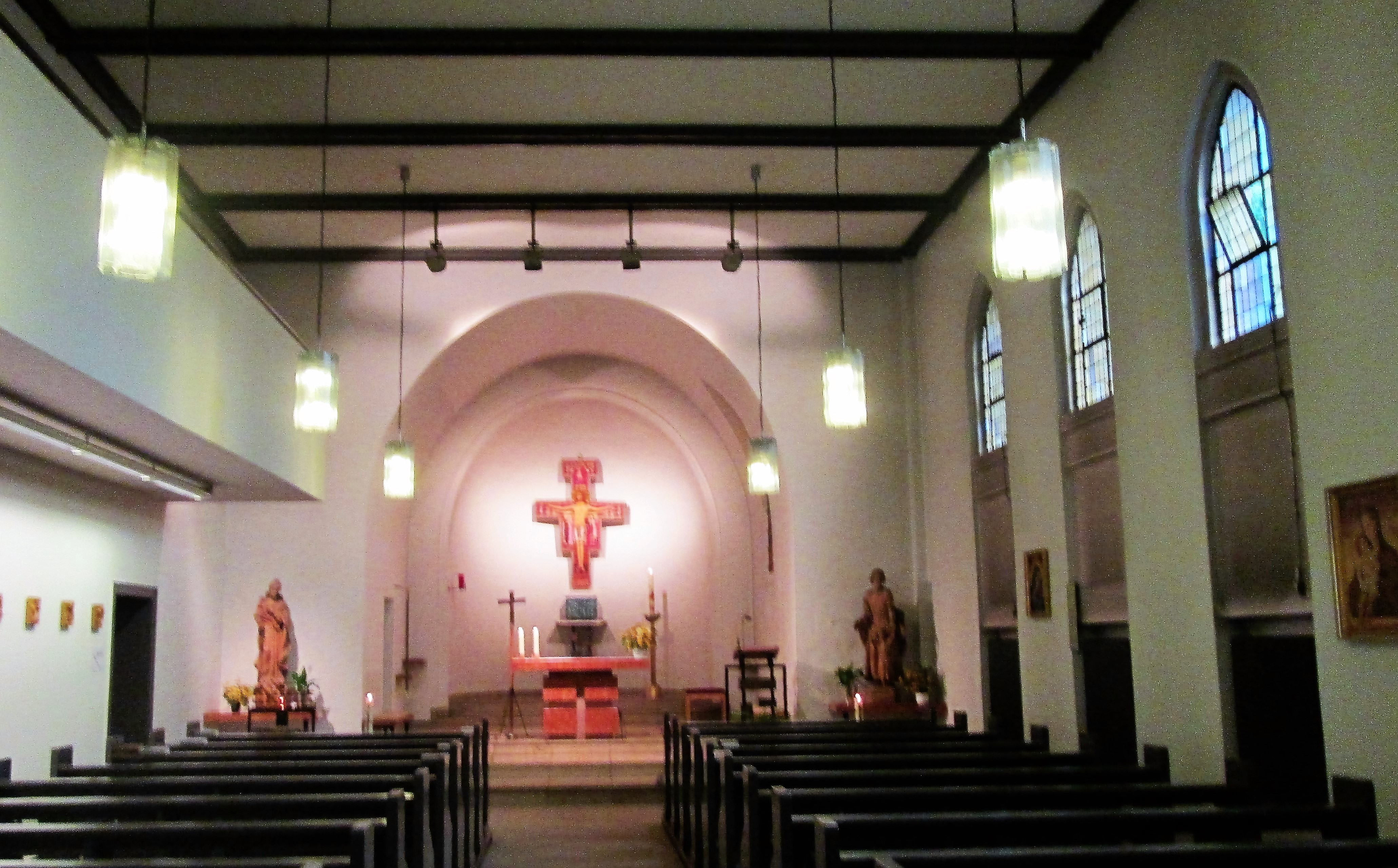 Sankt Elisabeth Seniorenheim, Berlin-Hakenfelde (Elisabethkapelle, Inneres)